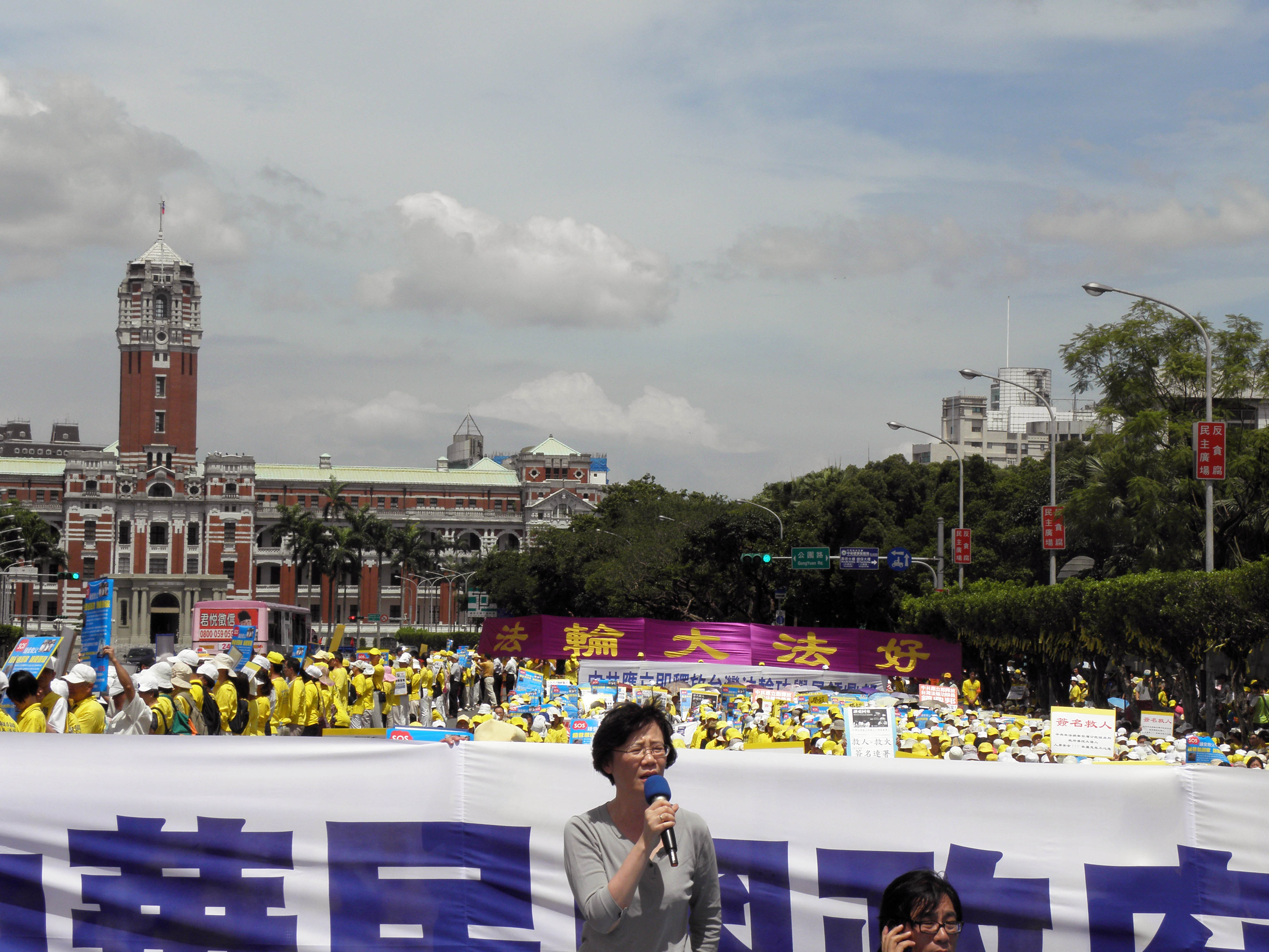 台湾法轮功在总统府前集会要求救援钟鼎邦 (美国之音叶兵拍摄)